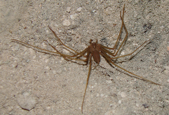 Fêmea de Loxosceles ericsoni sp. n, na Gruta Bonita, Parque Nacional Cavernas do Peruaçu, Estado de Minas Gerais, Brasil